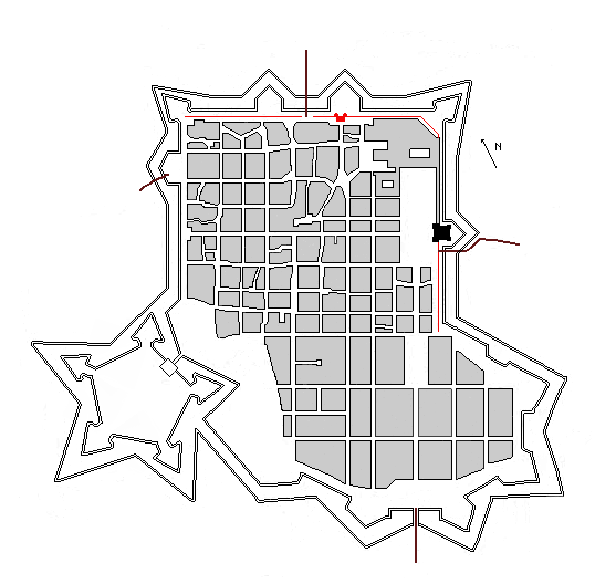 Mappa di Torino in occasione del 1° ampliamento del 1620